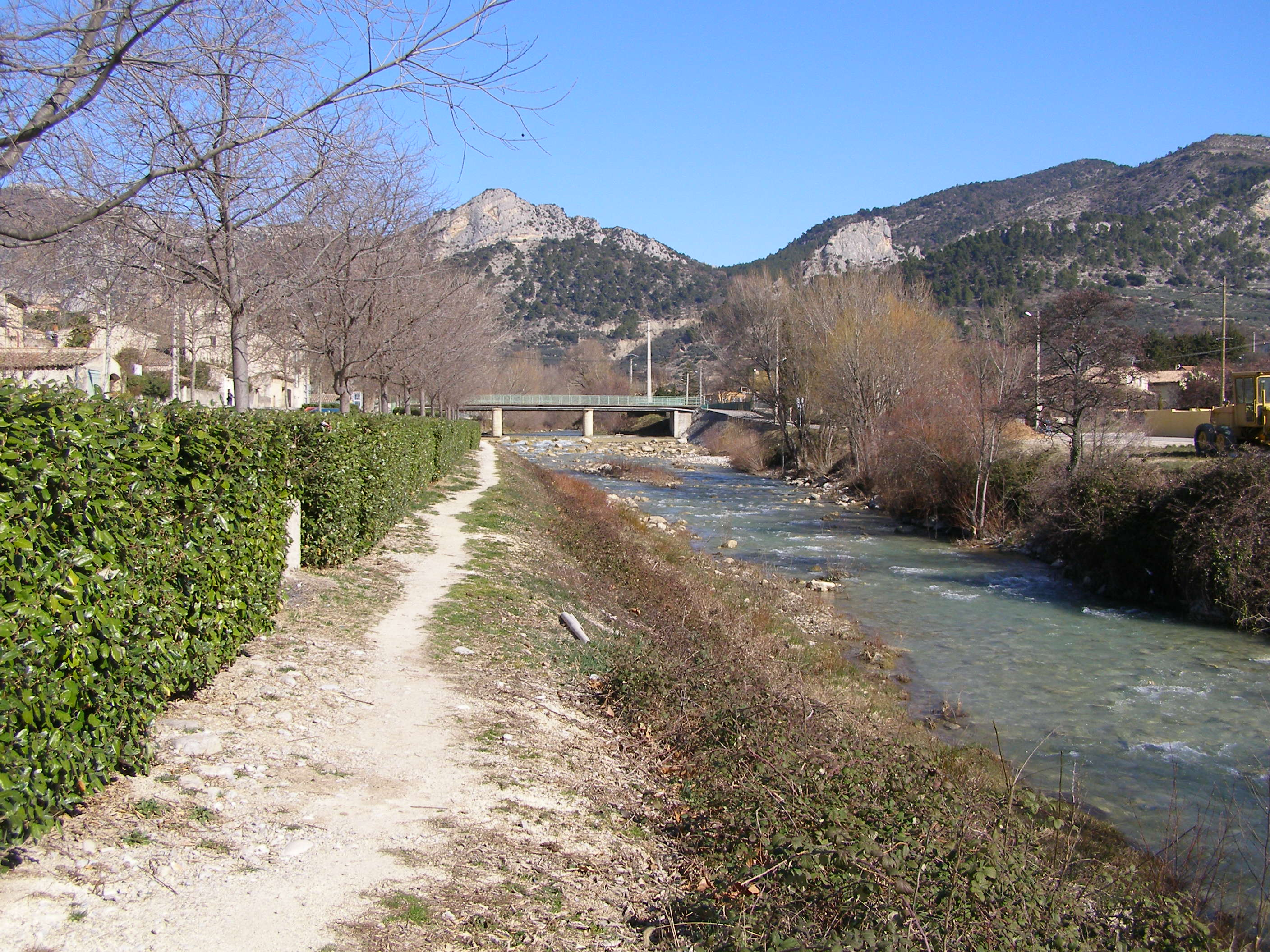 L'Ouvèze à Buis-les-Baronnies (Drôme, France). A gauche, boulevard de la Tour du Pin. Au centre, pont débouchant (à gauche) à la place de Verdun. Au fond, la montagne des Plates (gauche), l'Ubrieux (centre) et l'Aiguille (droite). La rivière coule vers nous (nous nous tenons donc sur la rive droite).